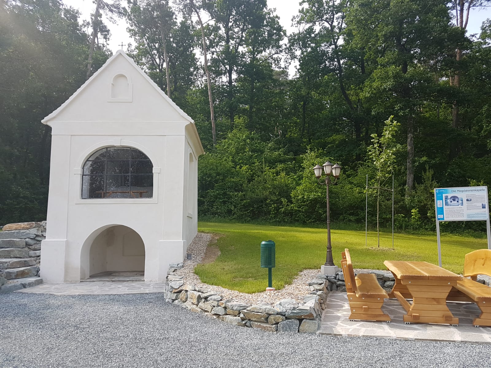 Renovierung der Magdalenenkapelle durch den Ortsverschönerungsverein Sankt Kathrein im Jahr 2018